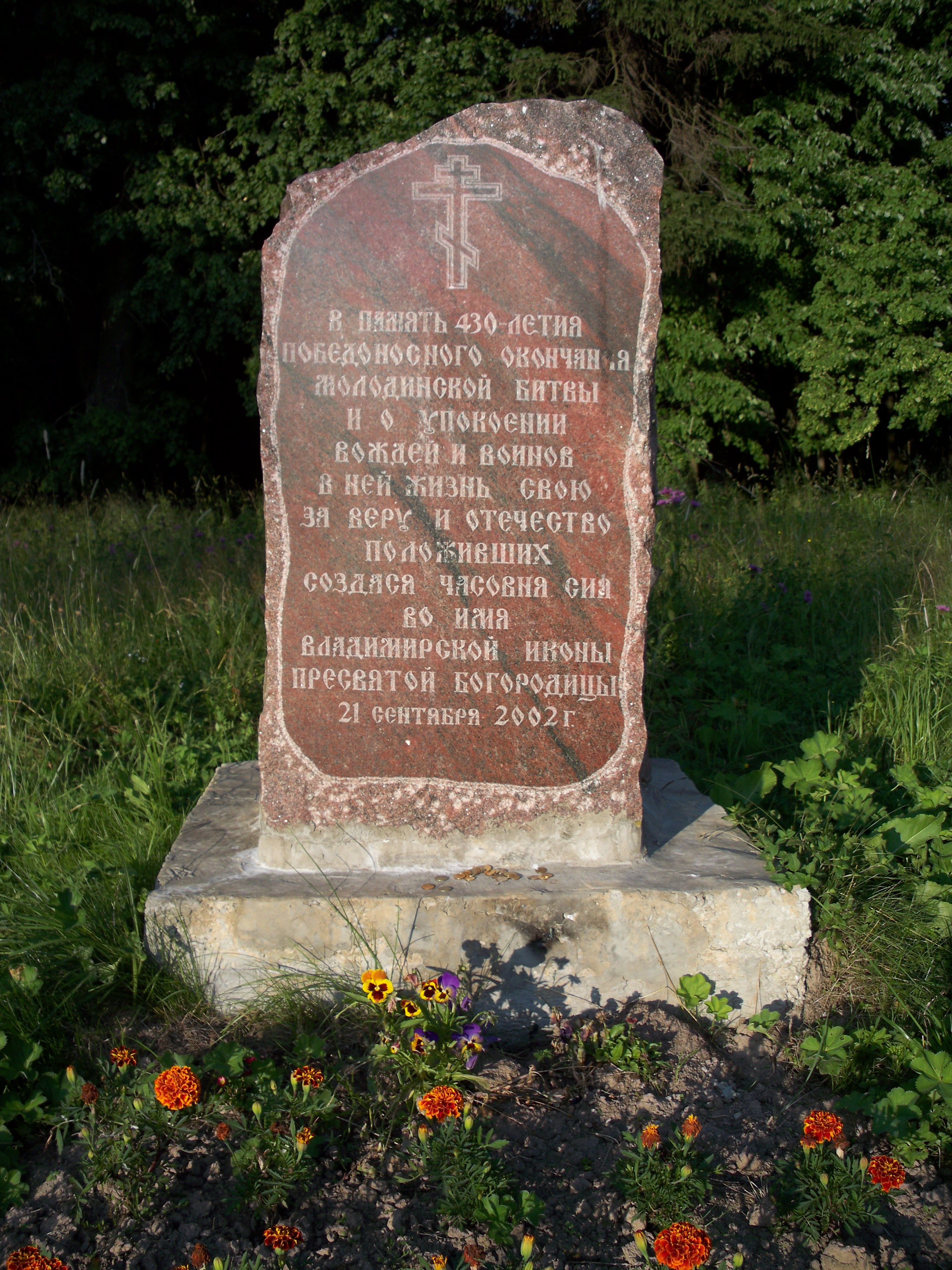 Село Молоди. Закладной камень в память победы в Битве при Молодях в 1572 году.